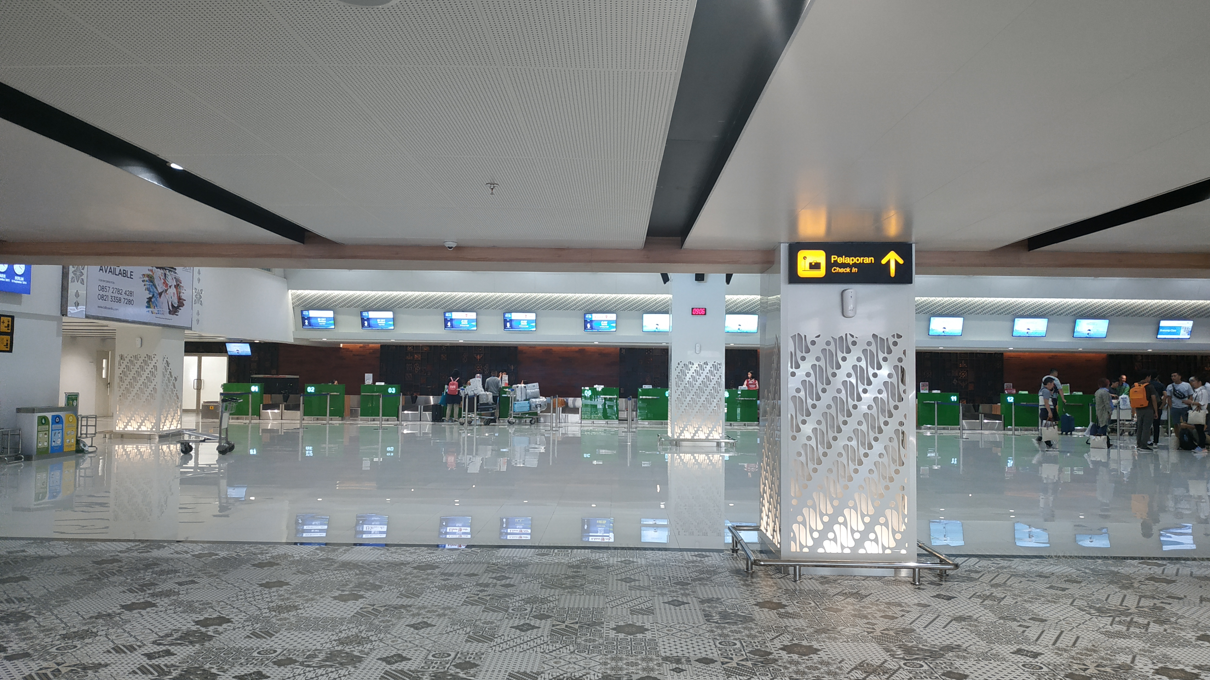 Bandara internasional Adi Sumarmo, Boyolali, Jawa Tengah